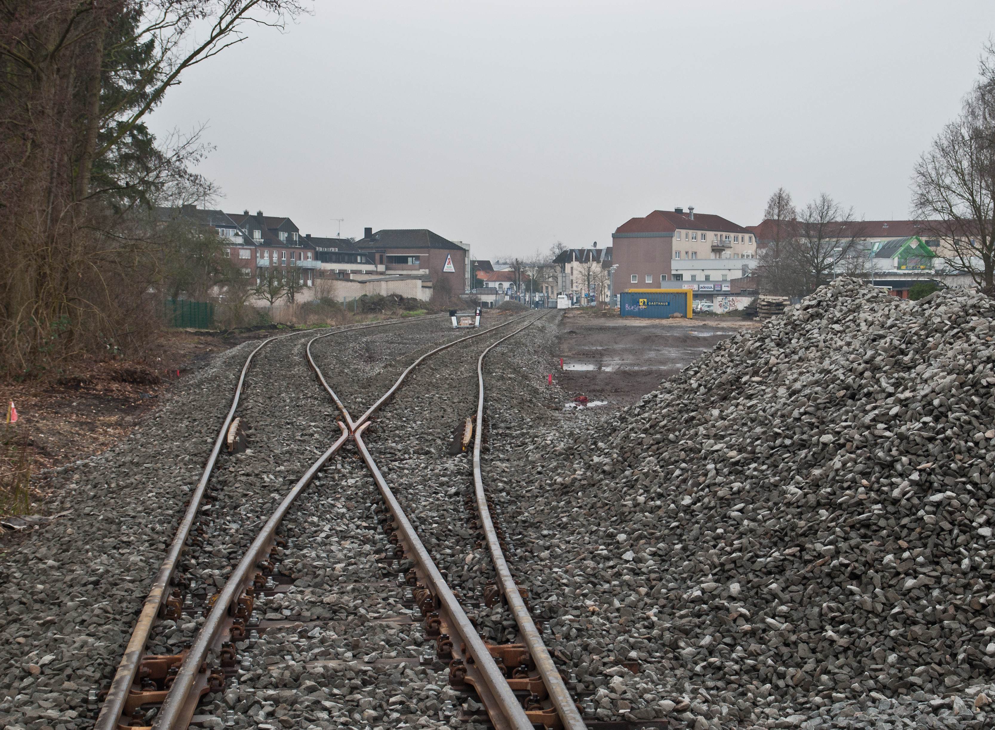 Gleisbereich im Bahnhof Heinsberg, Zustand vom 16. Feb. 2013. Vollständig neu errichteter Gleisbereich, nur noch zwei Stumpfgleise ohne Umfahrungsmöglichkeit als Streckenabschluss. Neubaugleis eingeschottert, aber noch nicht gestopft, daher deutliche Gleislagefehler